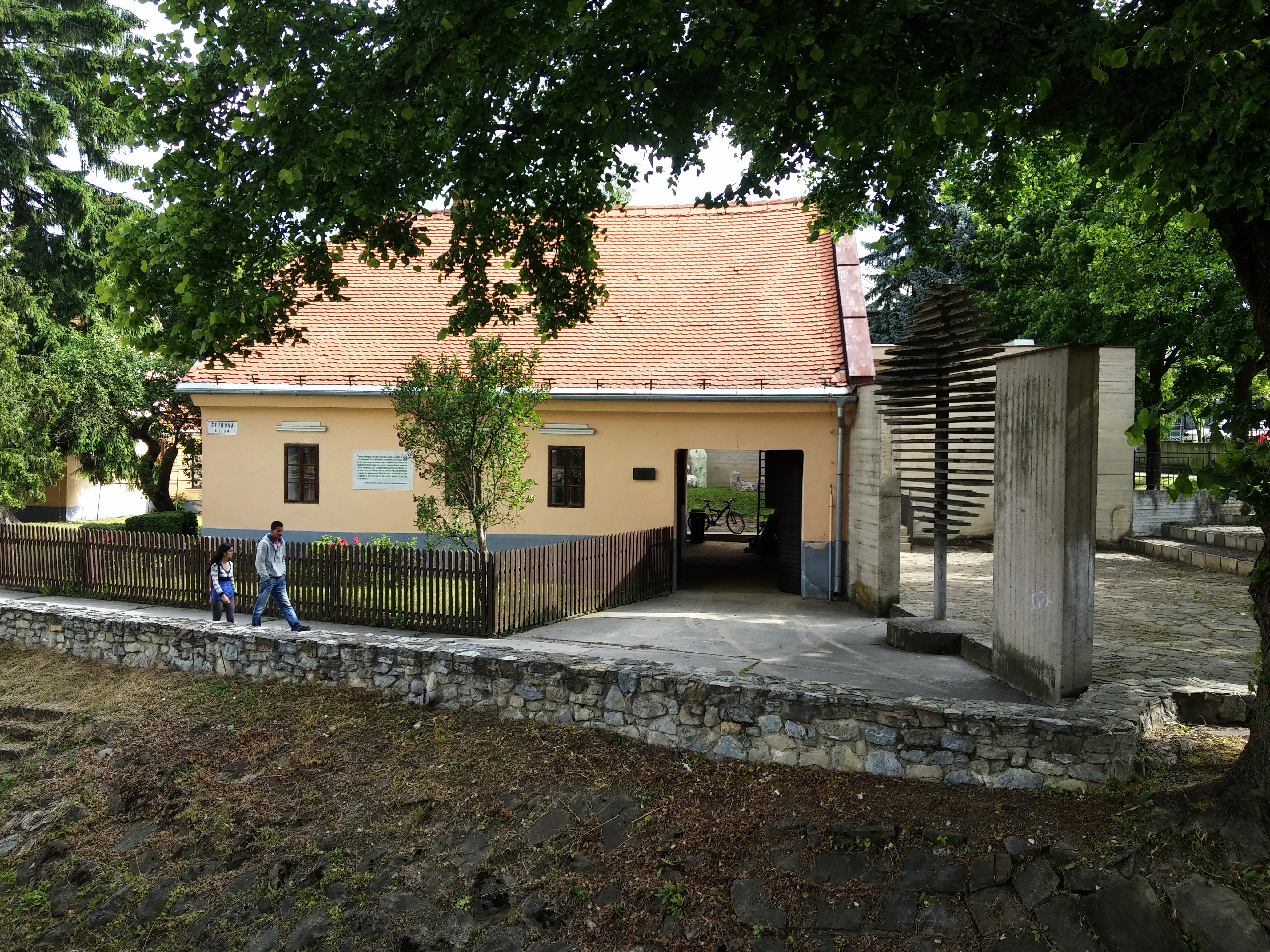 DOM ĽUDOVÝ I. PAMÄTNÝ+I.SNR-1848,hurbanovci;Koléniovej dom